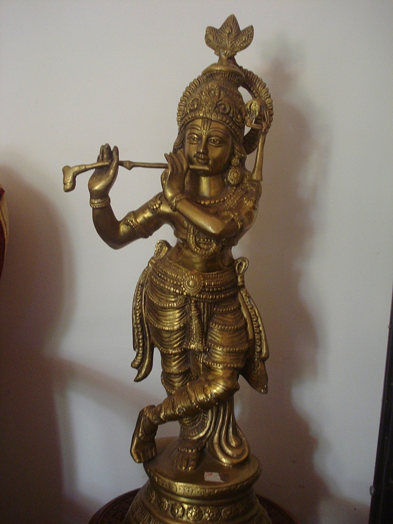 ശ്രീകൃഷ്ണൻ